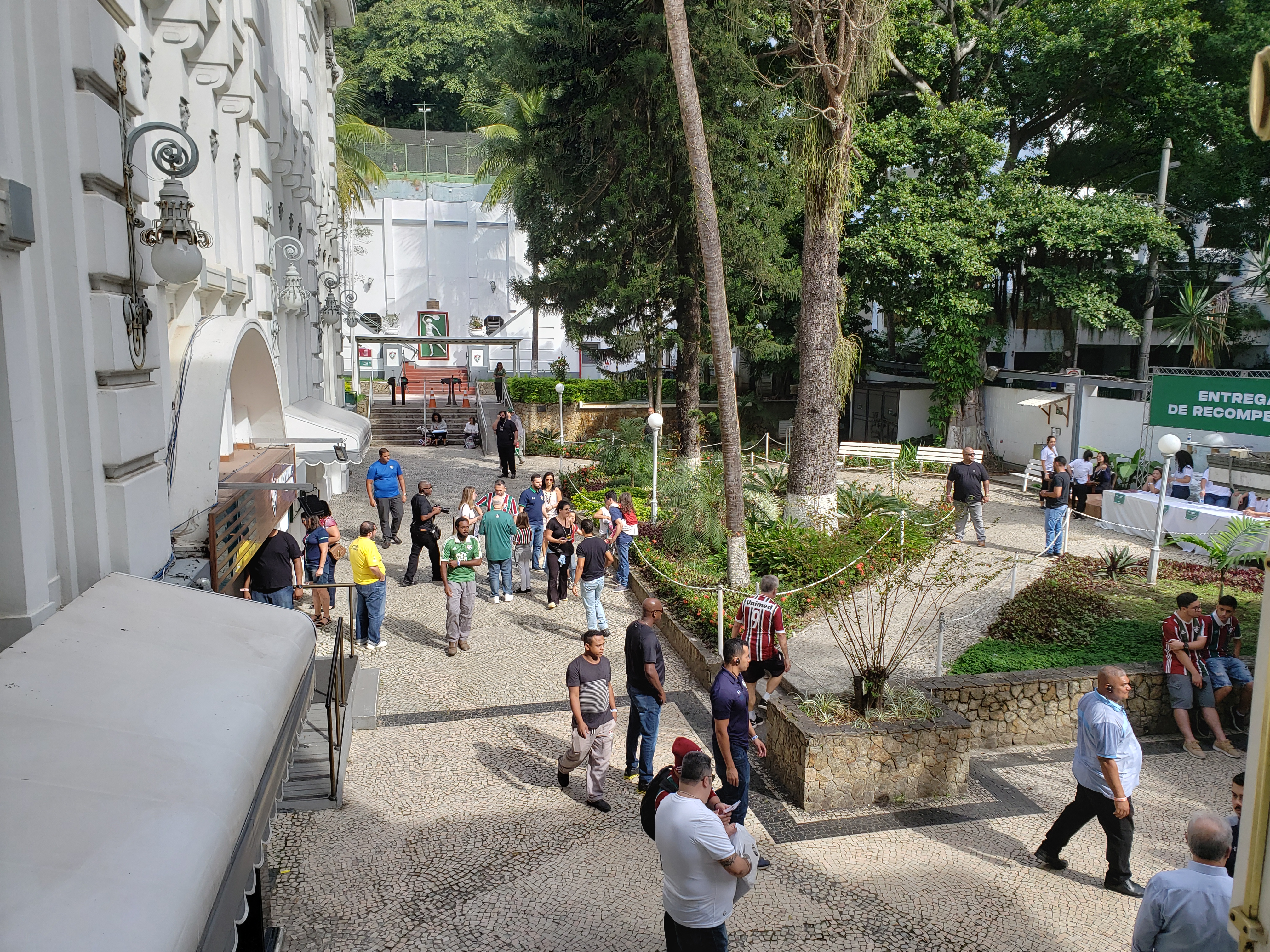 Visão da entrada da sede do Fluminense Football Club em 21 de julho de 2019, data do 117º aniversário do clube.